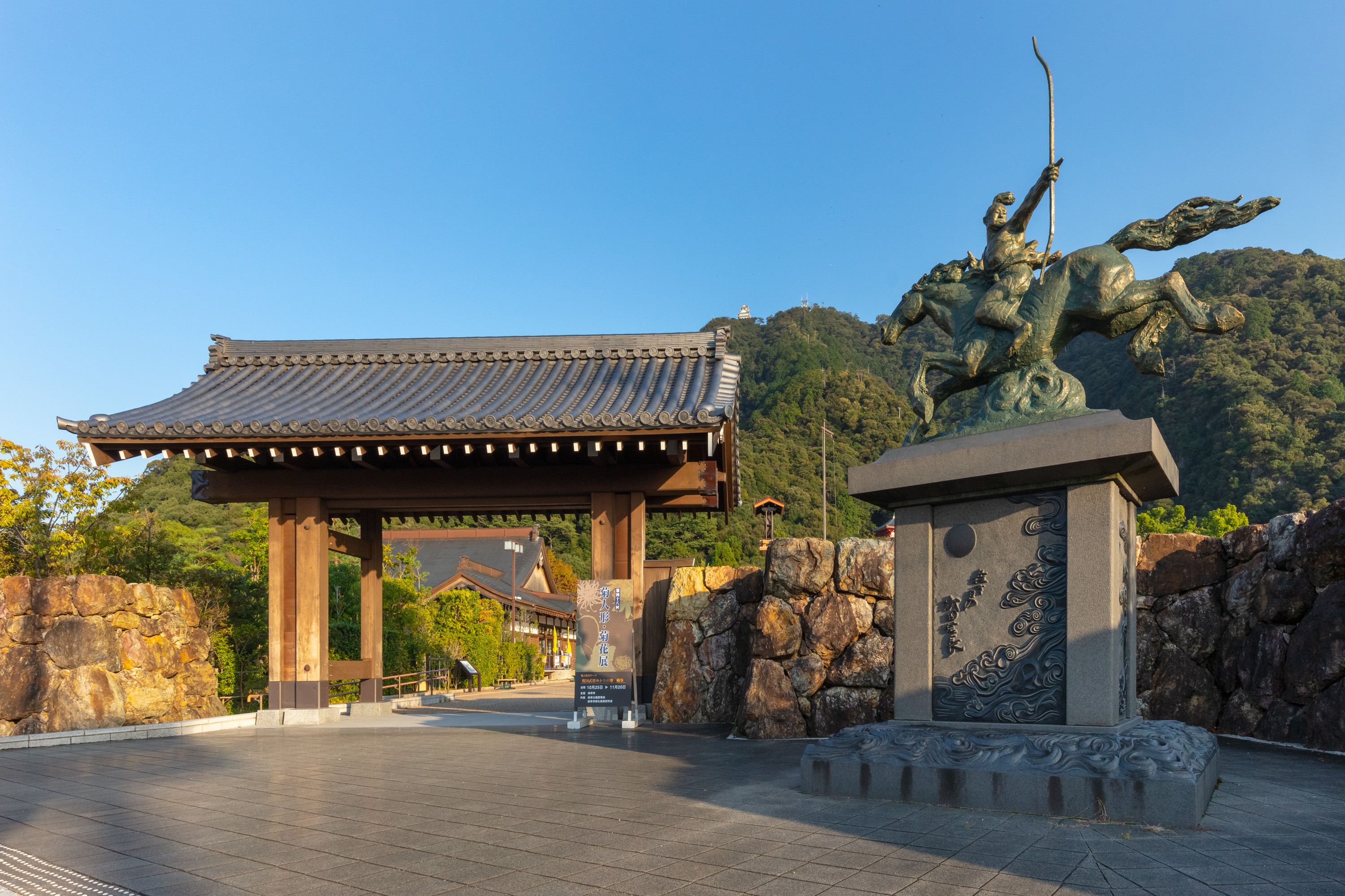 岐阜公園-正門と若き日の織田信長像